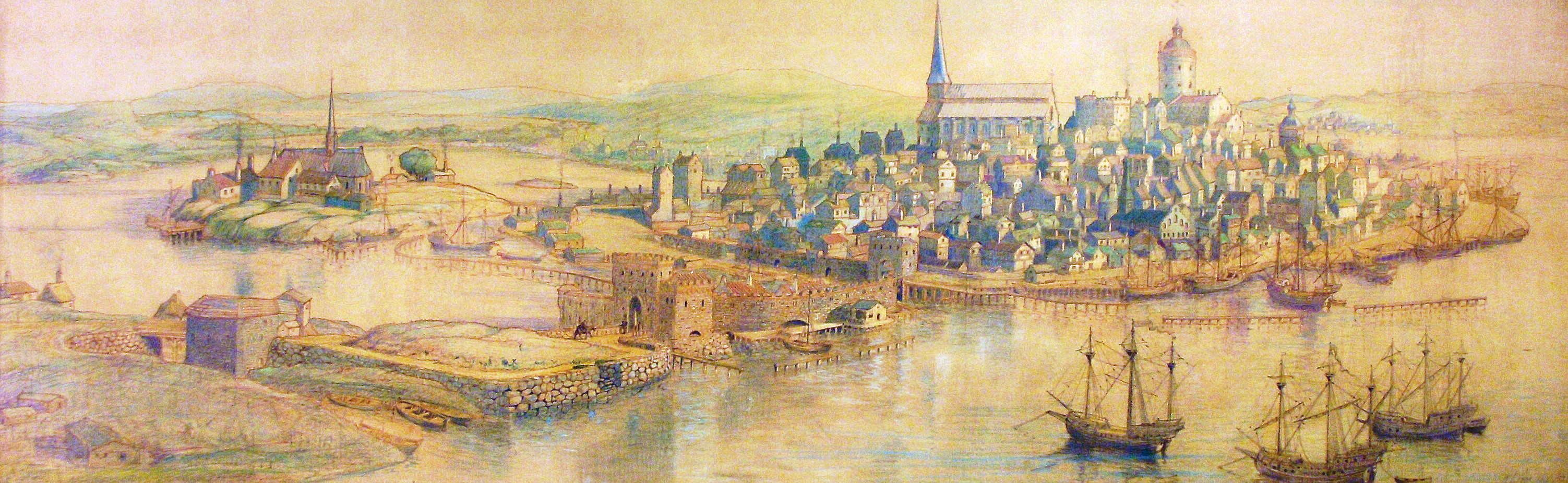 Stockholmspanorama efter Hogenberg från Södermalm